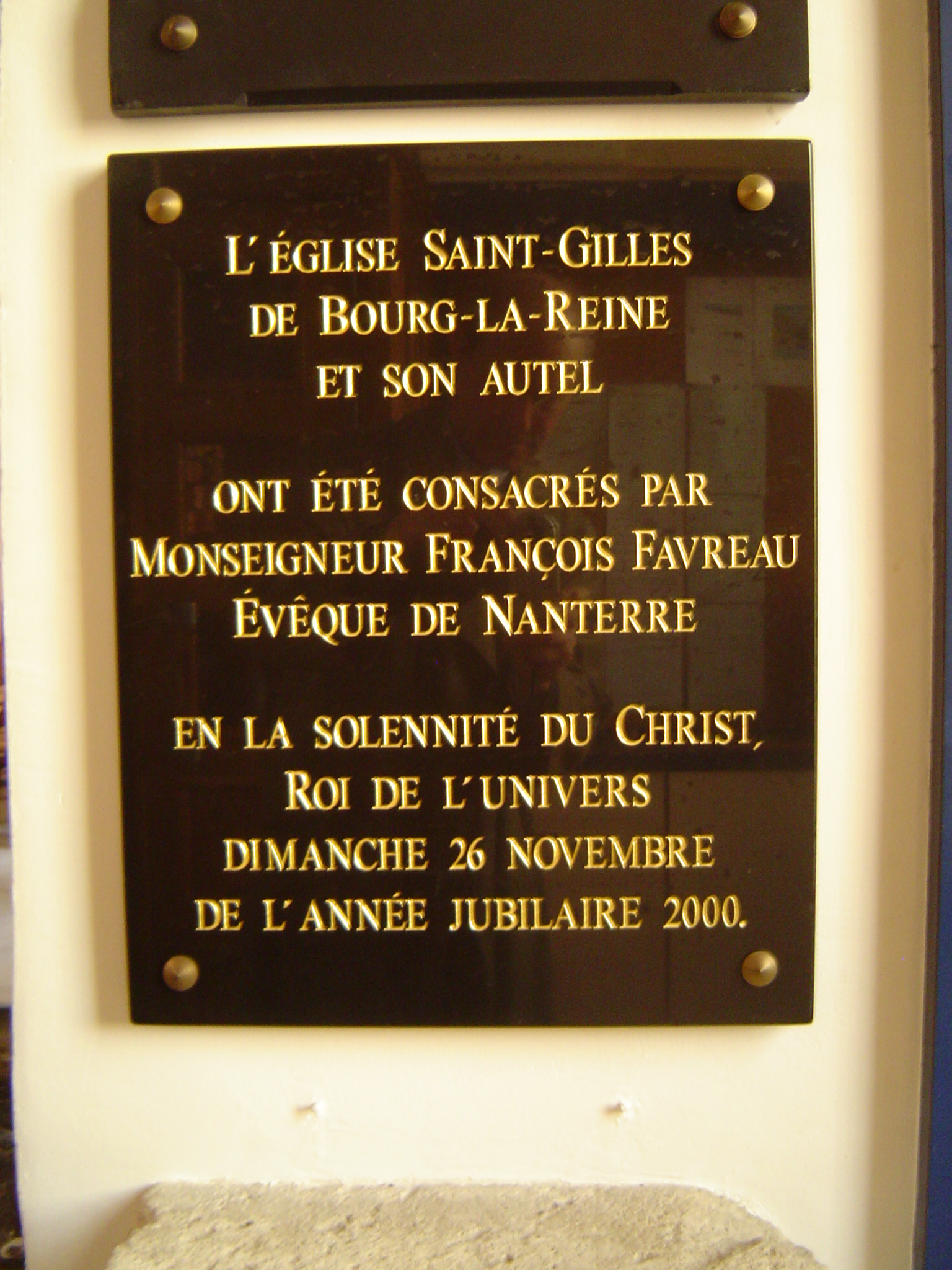 Photos prises à Bourg-la-Reine, commune française des Hauts-de-Seine